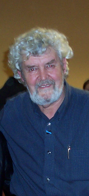 Retrato de Xose Manuel Beiras Torrado. A imaxe non é de moi bóa calidade, pero súboa porque so hai unha del na que aparece con Touriño e Zapatero. Foi sacada nunha charla na Facultade de Dereito da USC, nunha conferencia sobre Nacións sen Estado, xunto con Justo Beramendi. Categoría:Imaxes de personalidades da política de Galicia